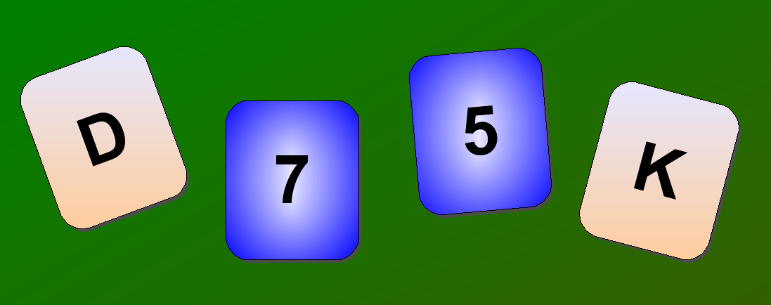 Auteur: Utilisateur:Ripounet Variante:thumb|left